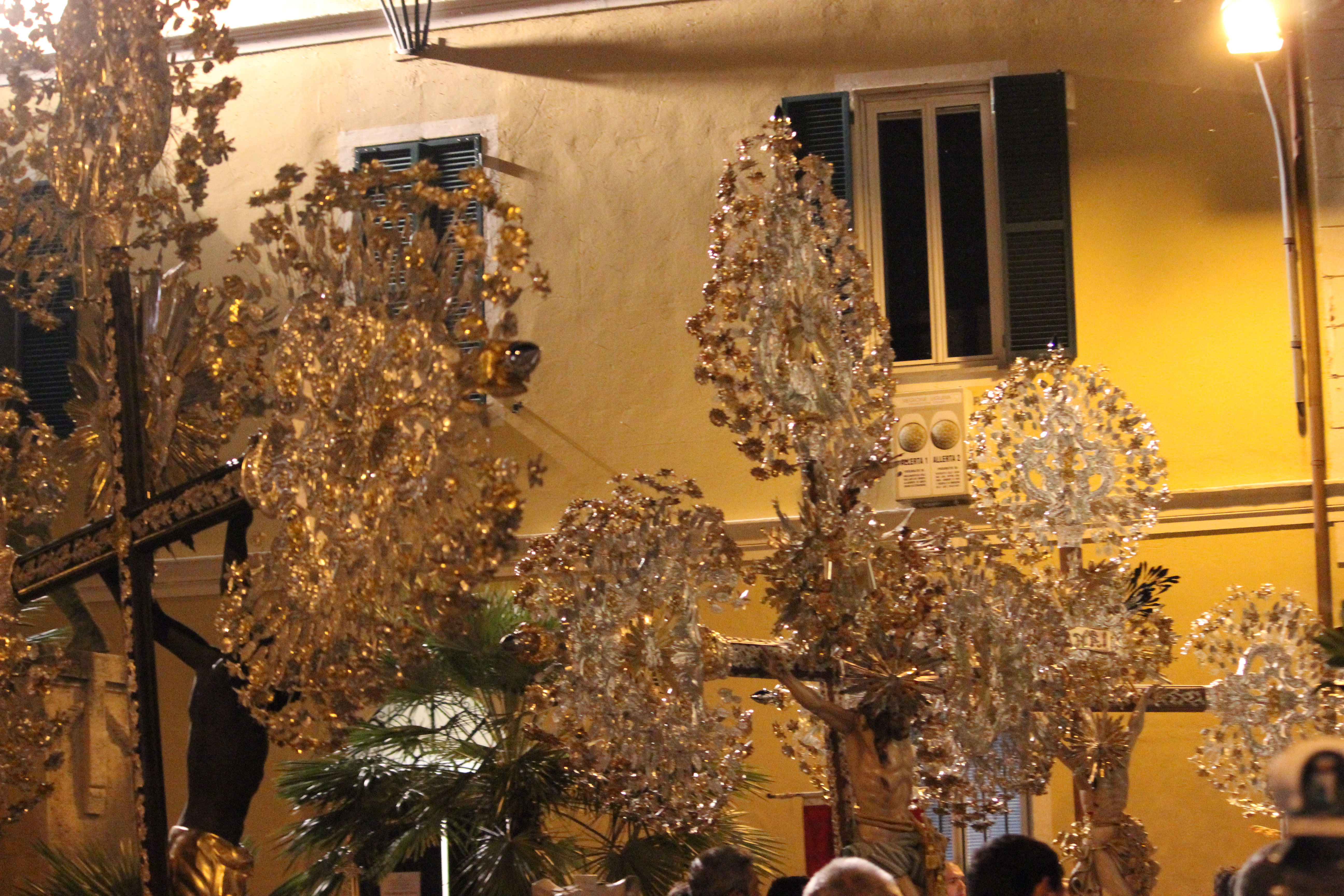 Foto durante la processione di Tovo San Giacomo del 2012